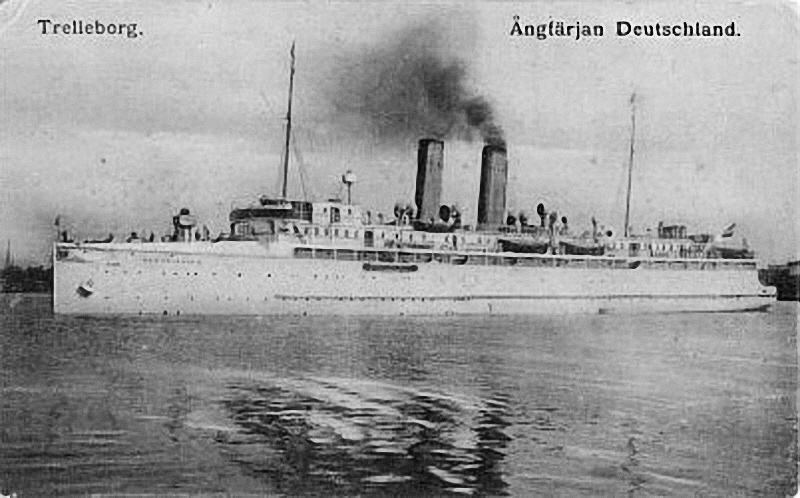 Deutsche Eisenbahn-Dampffähre "Deutschland" auf der "Königslinie" (Trelleborg - Sassnitz), Foto vermutlich im Hafen von Trelleborg (Schweden). Ersteigentümer: Preußisch-Hessische Eisenbahngemeinschaft, Königlich-Preußische Eisenbahndirektion Stettin (einfarbige Schlöte). - ab 01. April 1920 Eigentümer: Deutsche Reichseisenbahnen (gemäß RGBl. 1920 I, S. 773), Sassnitz (zweifarbige Schlöte) [1]